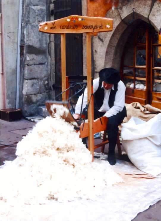 Cardeur